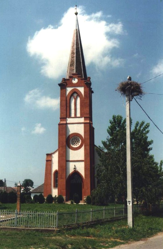 Balsai Református Templom